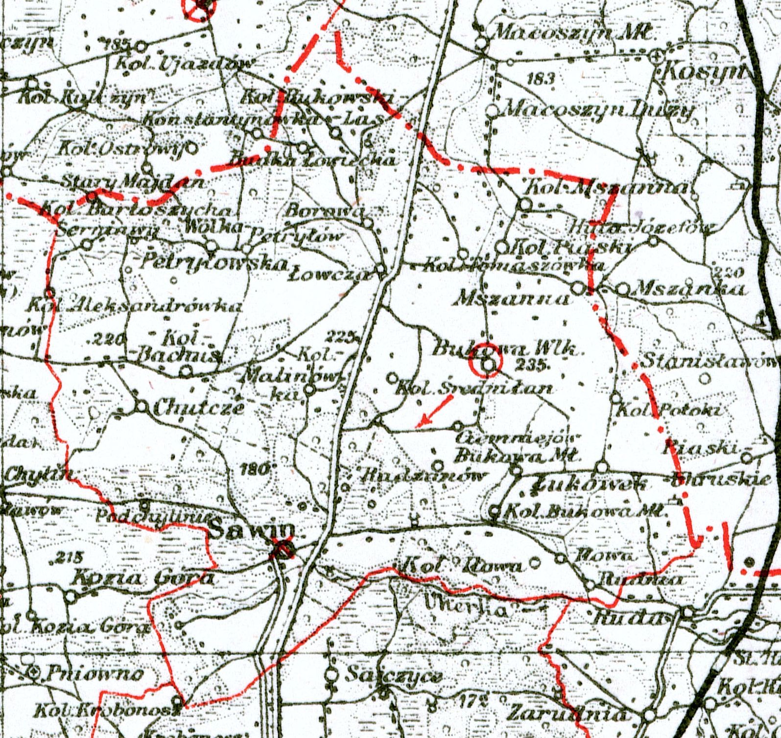 Gmina Bukowa (powiat chełmski) na mapie administracyjnej Rzeczypospolitej z 1937 r